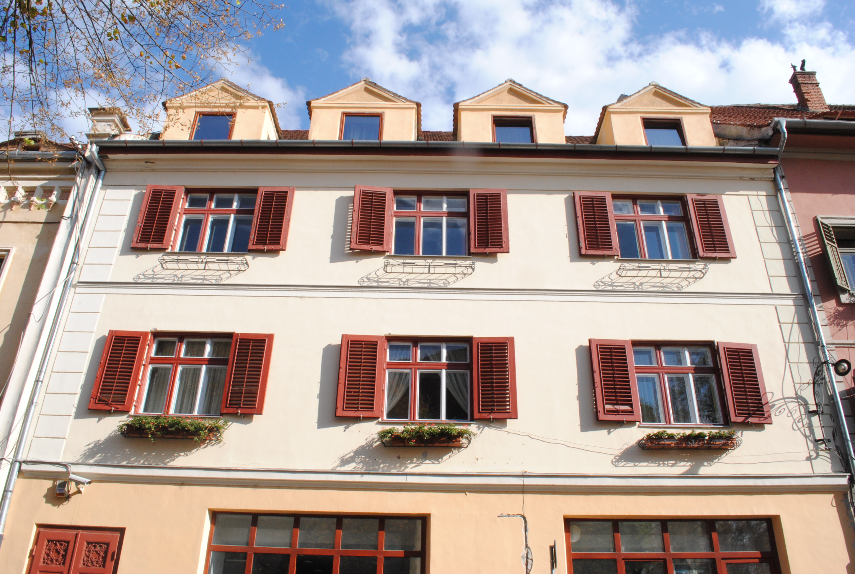 Casă, sec. XV - XVI,1930 - 1940